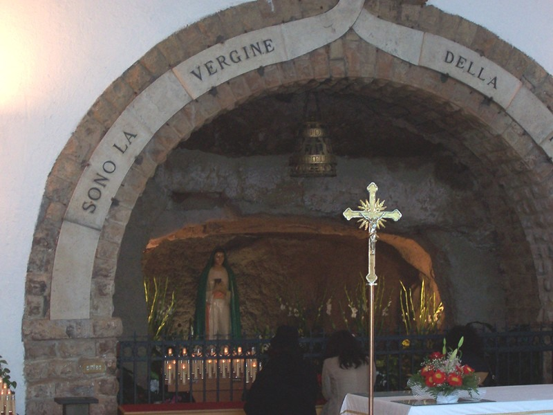 Roma - Grotta della Madonna della Rivelazione alle Tre Fontane